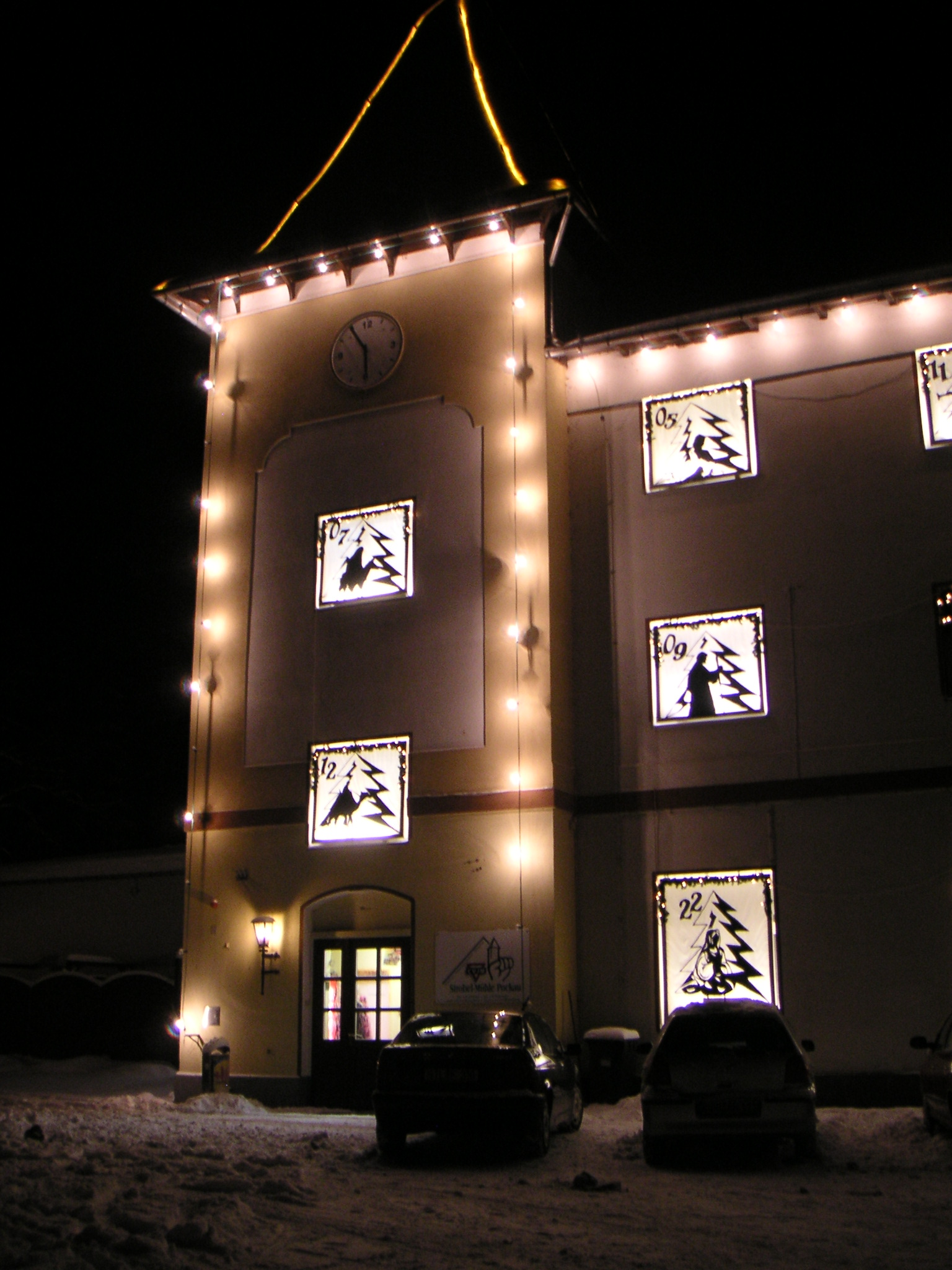 Die Fenster der Strobelmühle als Adventskalender gestaltet